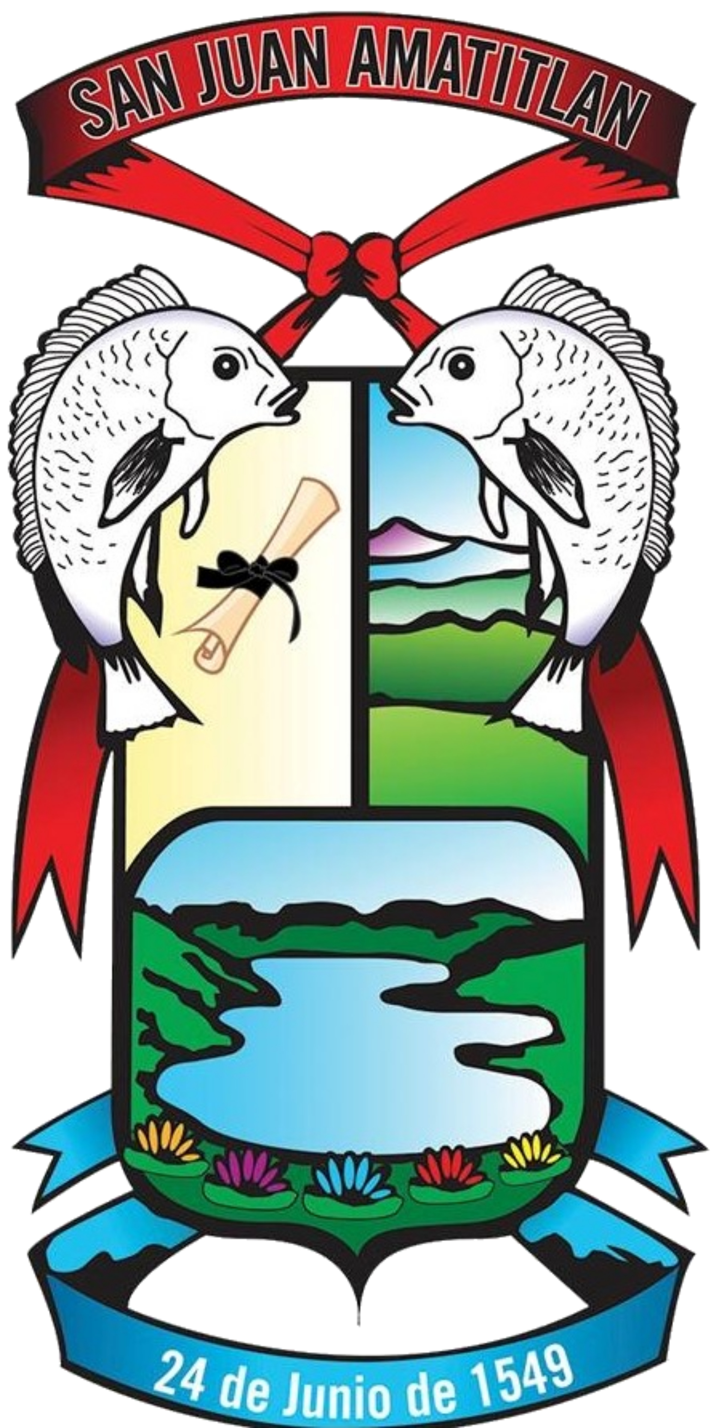 Escudo de Amatitlán, ganador del concurso organizado por la Municipalidad de Amatitlán en el año 1984. Su autora es la Licda. Aracely Judith Samayoa Godoy de Pineda